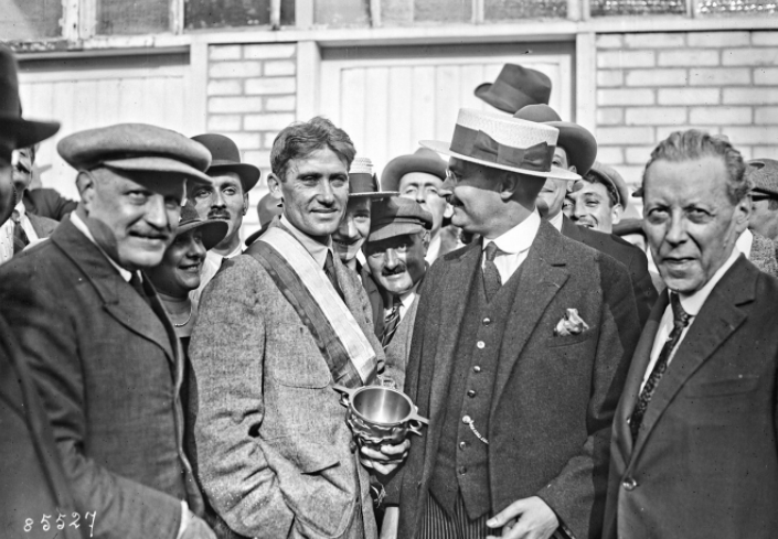 Parc des princes, 22/7/23, Henri Pélissier, vainqueur du Tour de France